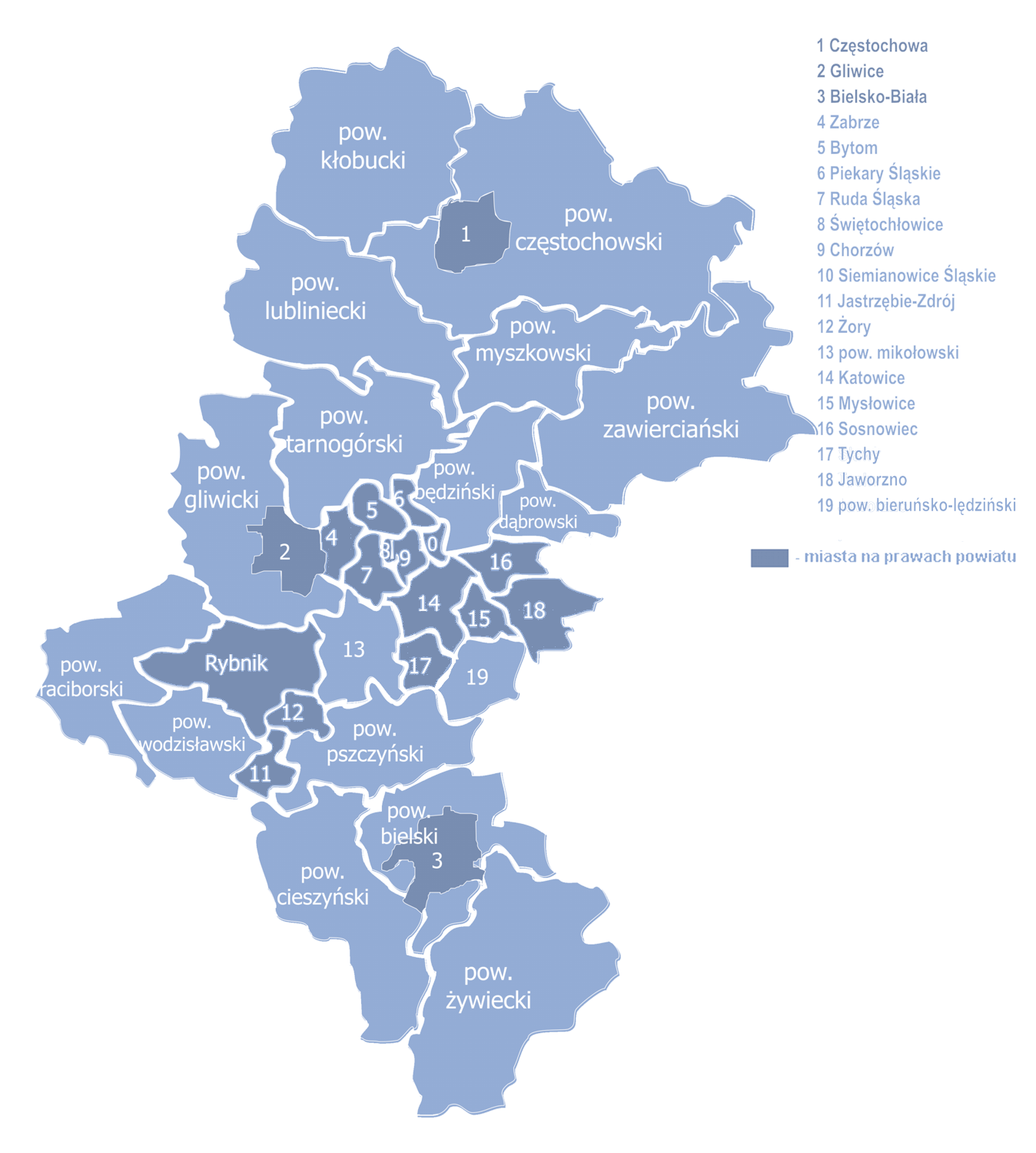 Podział administracyjny województwa śląskiego na powiaty i miasta na prawach powiatu